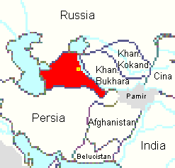 canato di kiva